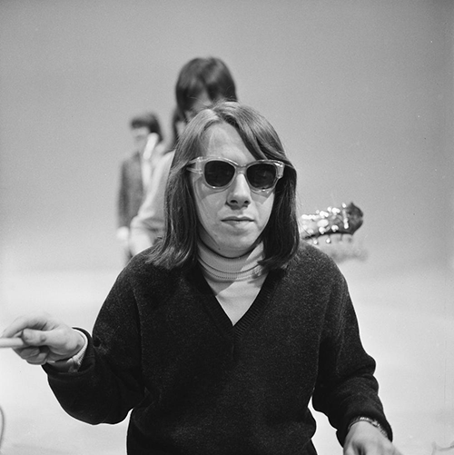 Q65 in het televisieprogramma Fanclub